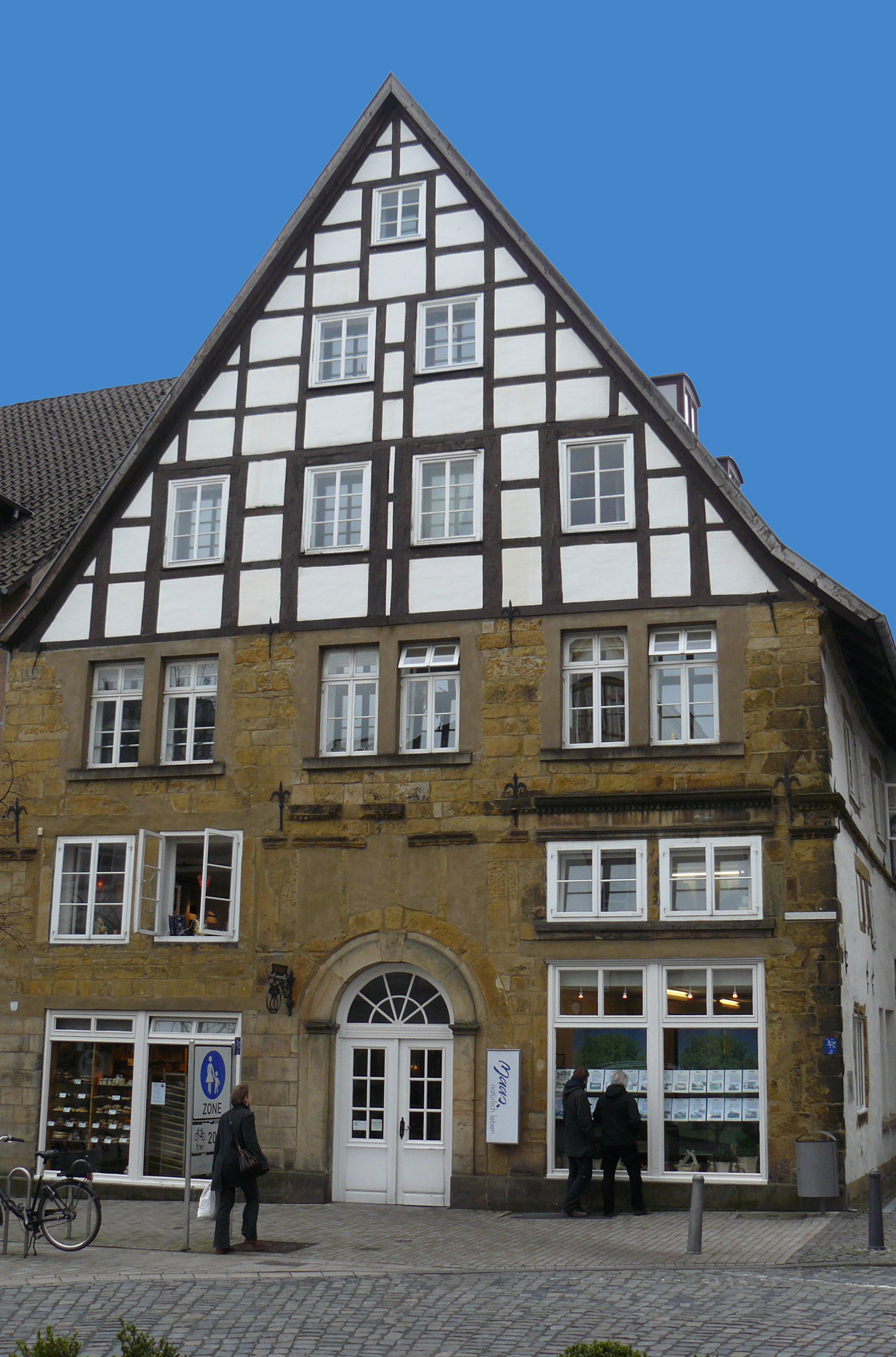 Ältestes Haus in Bielefeld (Adresse: Obernstraße 51, 33602 Bielefeld)